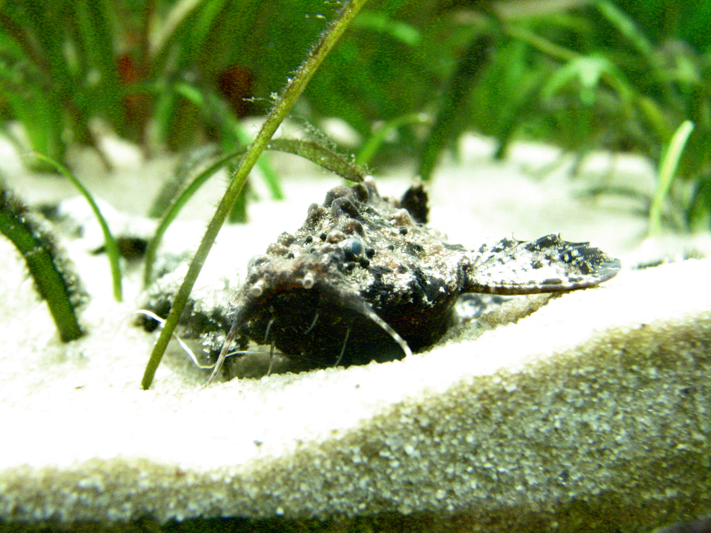 Bunocephalichthys verrucosus verrucosus, Bunocephalus verrucosus verrucosus, Hochrückiger Bratpfannenwels, Hochkopf Bratpfannenwels, Hoher Bratpfannenwels.